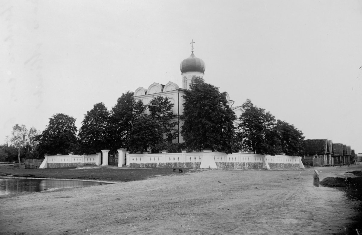 Беларуская (тарашкевіца): Станькаў (Stańkaŭ). Царква